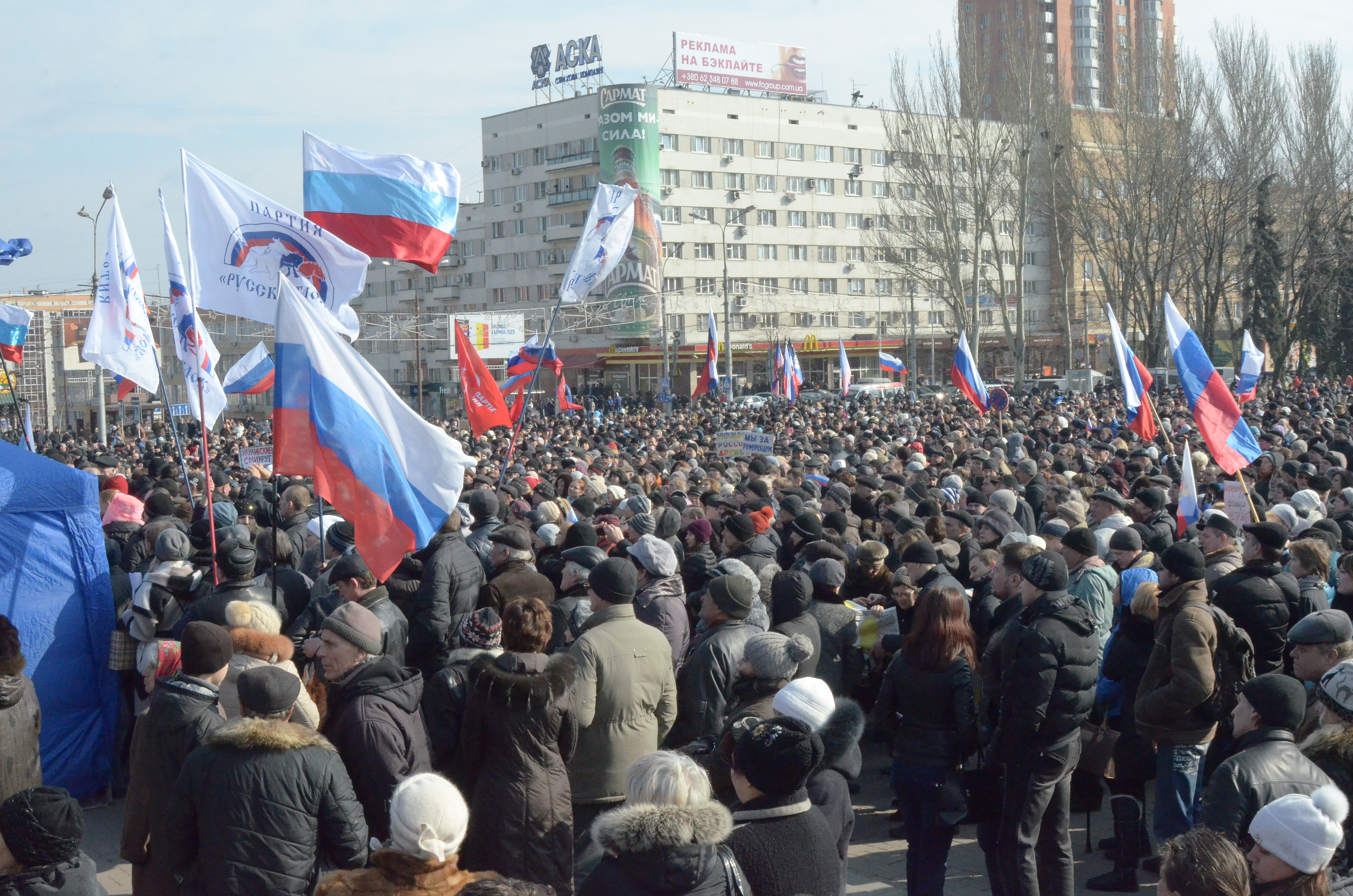 Протесты в Донецке